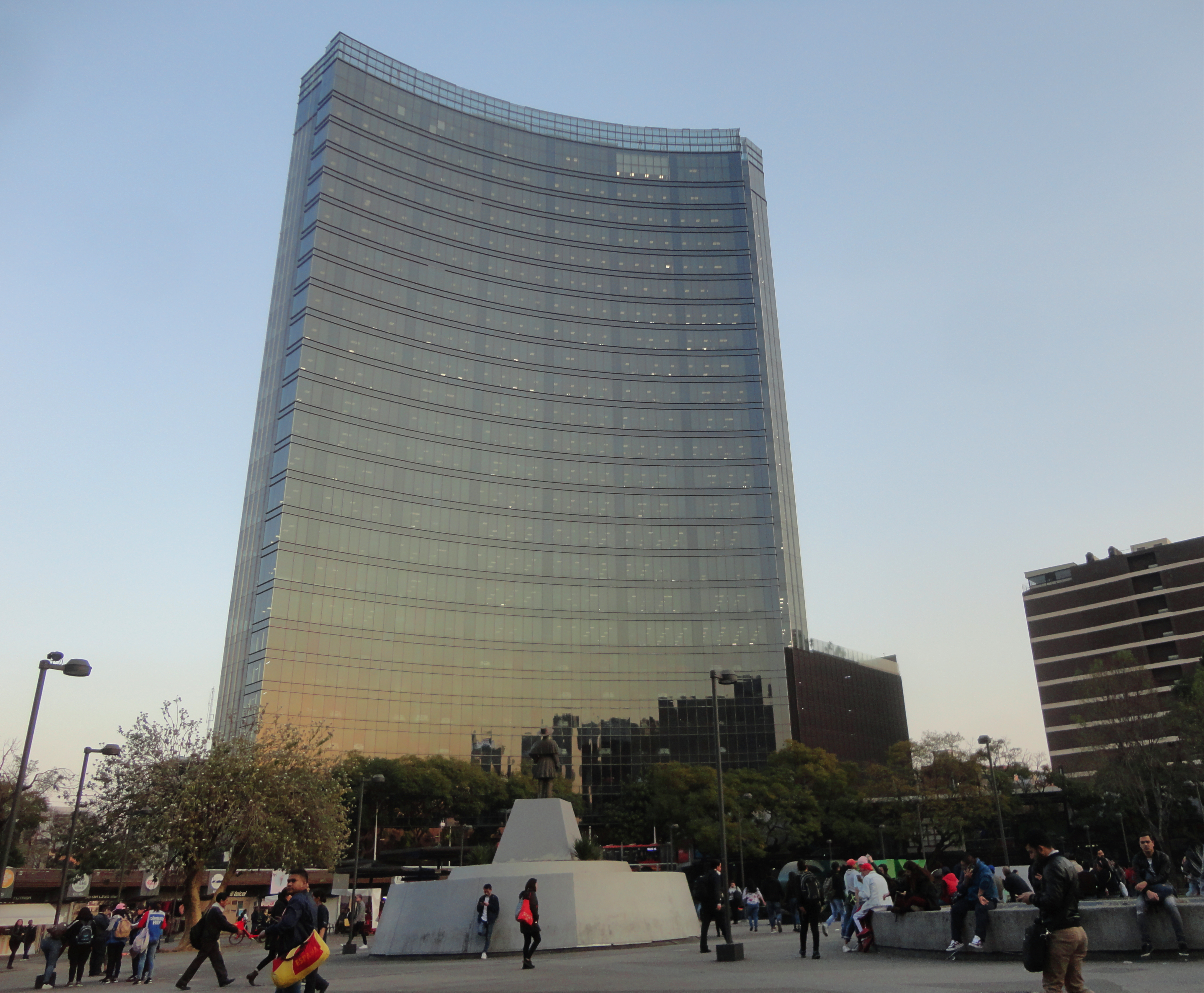 Torre Glorieta frente a Glorieta de los Insurgentes, Ciudad de México, México.